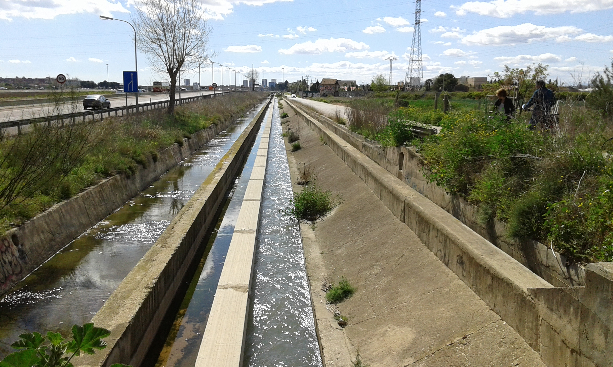 Séquia de Mislata